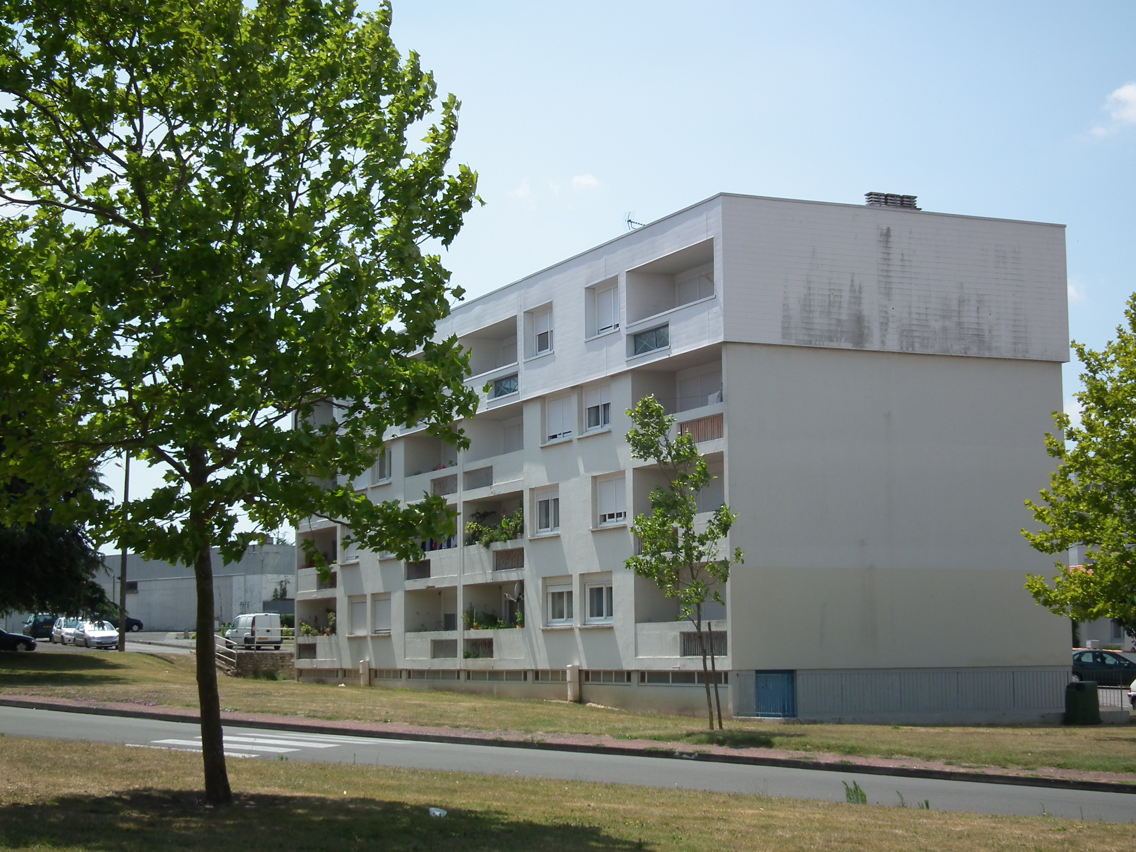 Immeuble du quartier de Marne-Yeuse